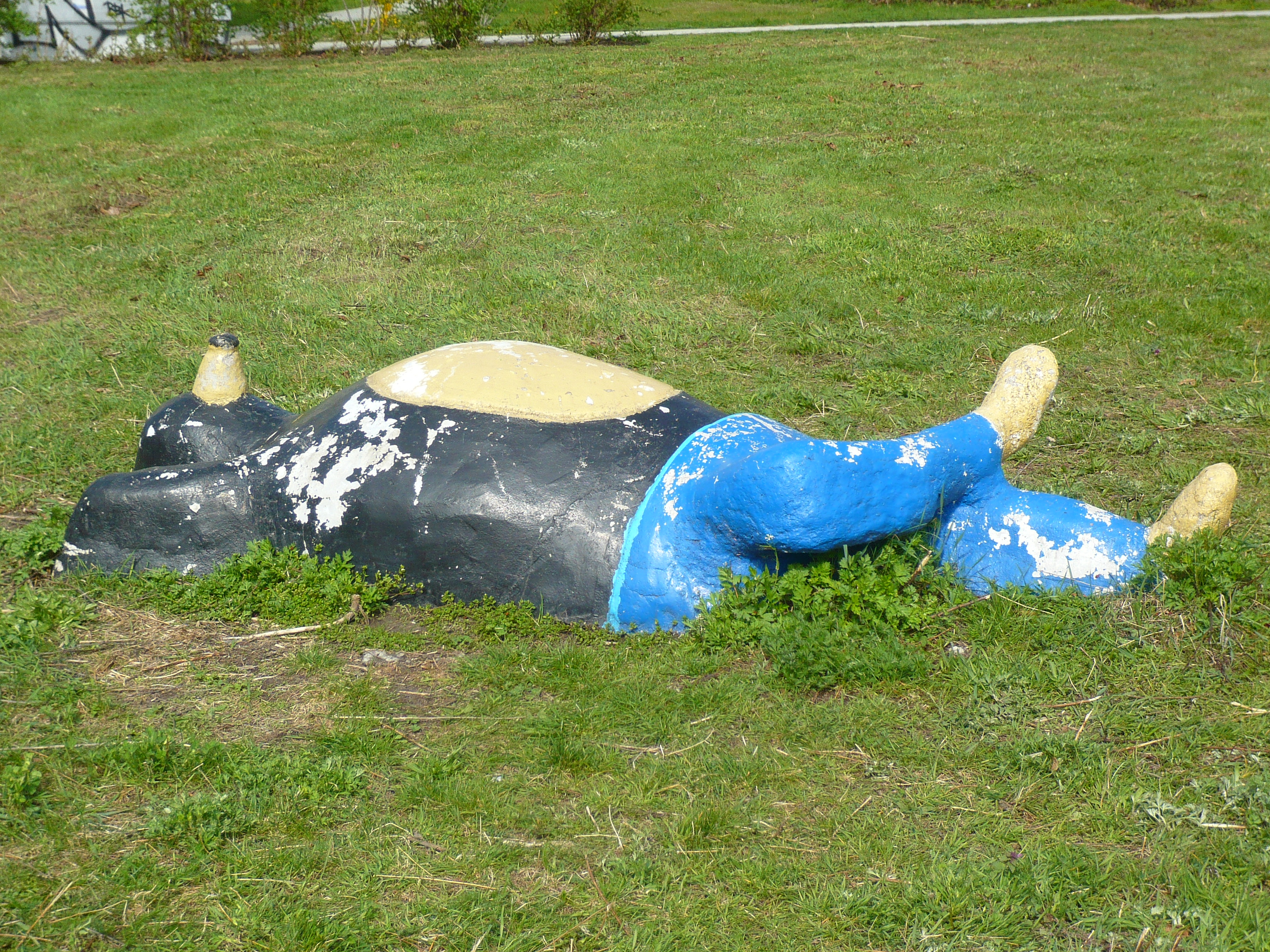 Ortsteil Berlin-Marzahn: Clara-Zetkin-Park